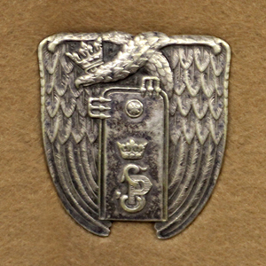 Odznaka Szkoły Podchorążych Piechoty - Ostrów Mazowiecka (absolwencka)